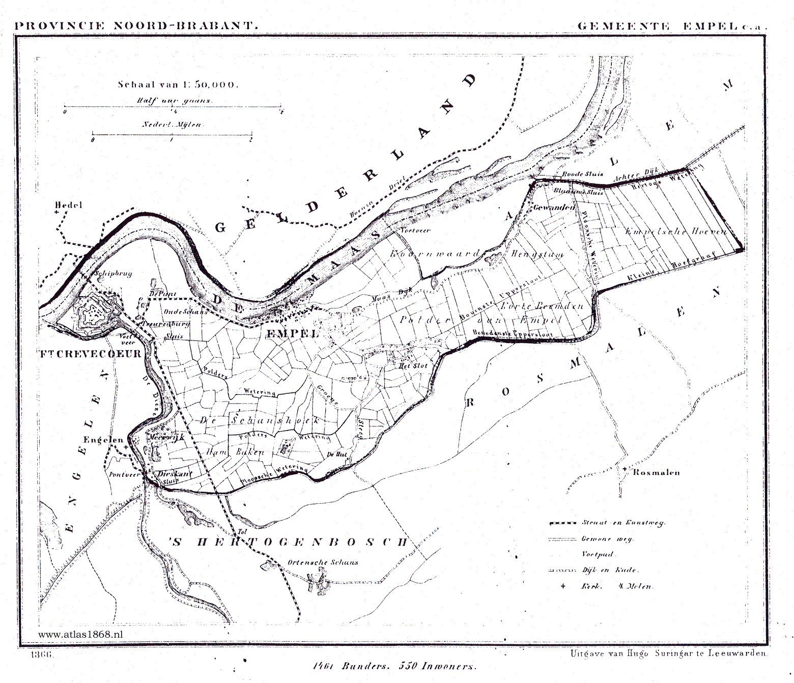 Landkaart van Empel en Meerwijk 1865-1870